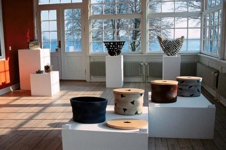 Udstiling af keramiske værker ved Danmarks Keramikmuseum - Grimmerhus, Middelfart.